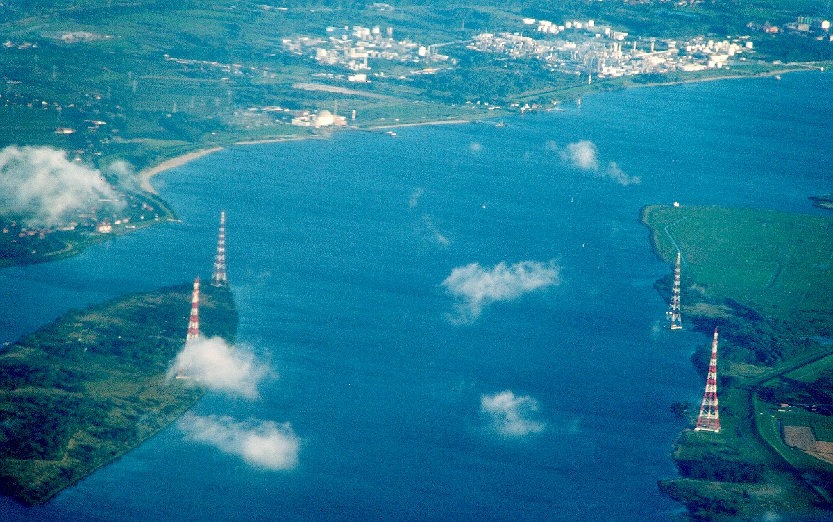 Masten der Elbekreuzung 1 und 2,links: Lühesand; in der oberen Bildmitte das ehemalige AKW Stade